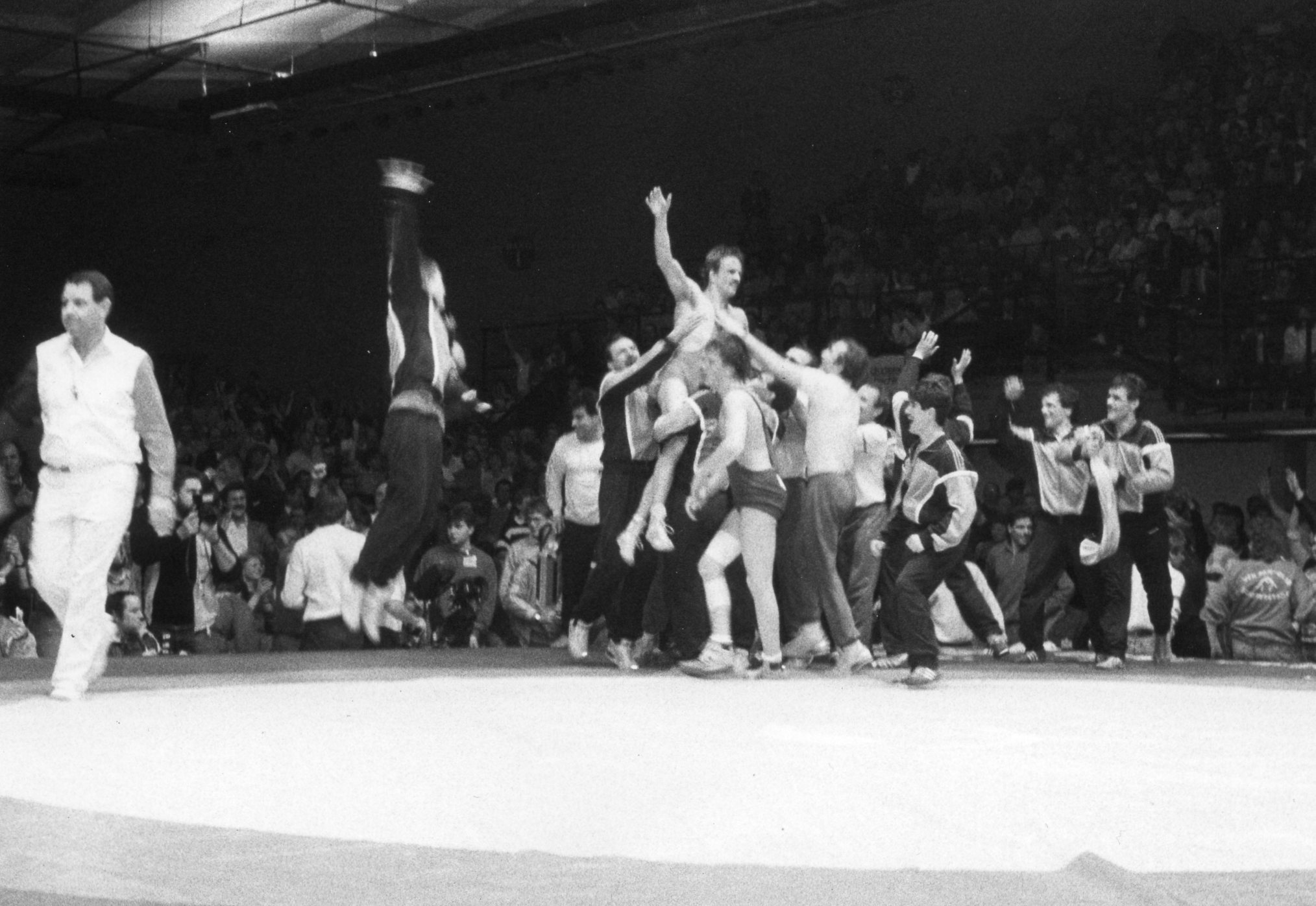 Gerhard Sattel (oben) - Deutscher Meister mit dem VfK Schifferstadt (1988)